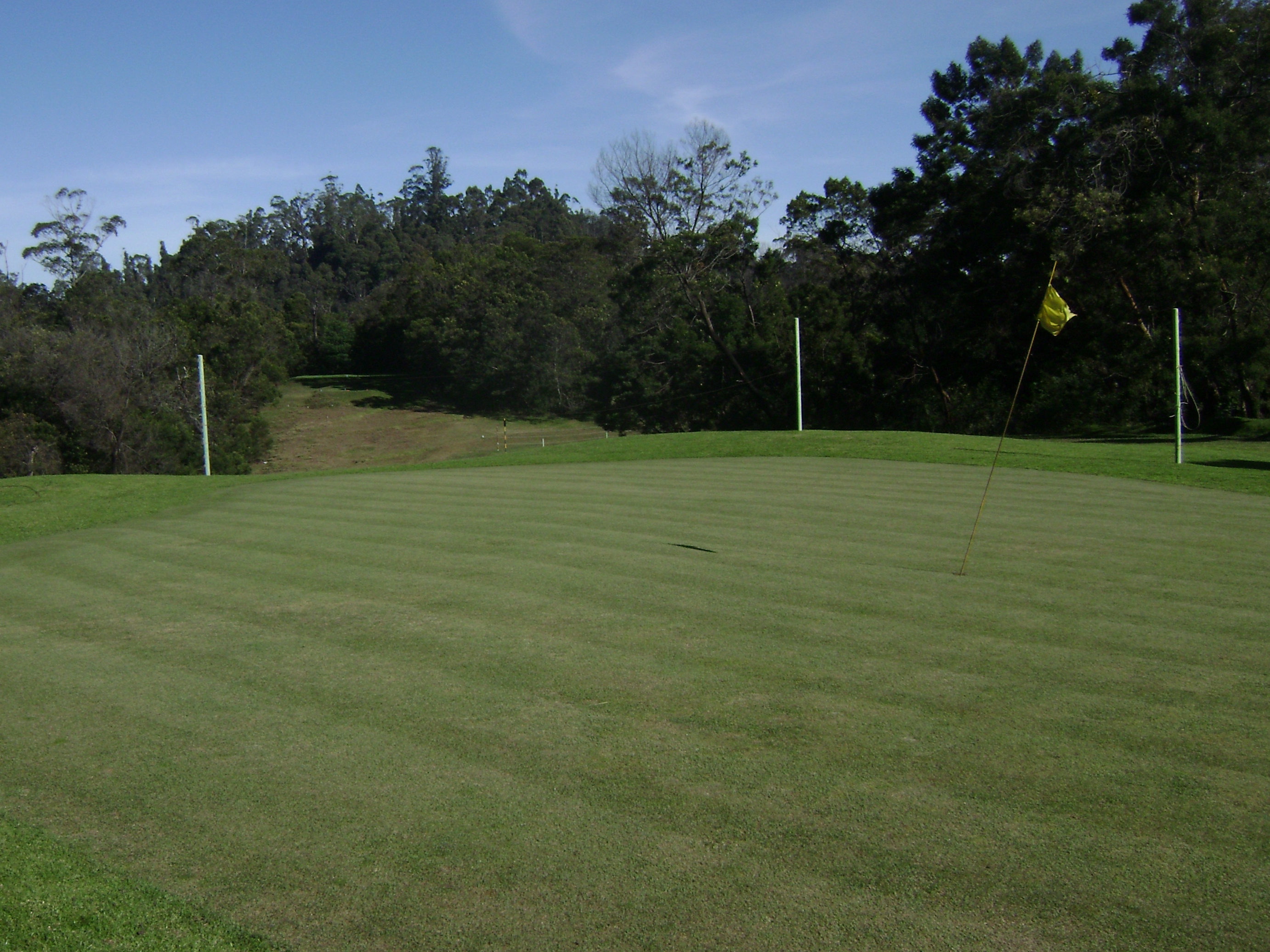 Kodaikanal Golf Course_groomed_green